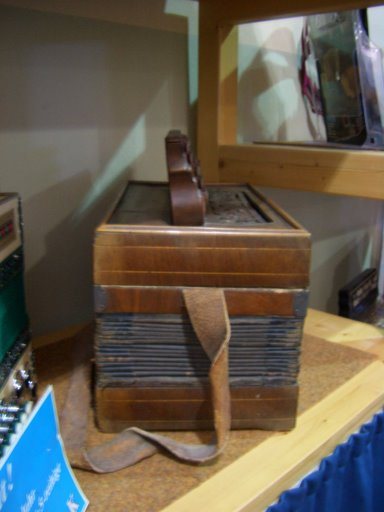 Novak ca. 1890 - 1900